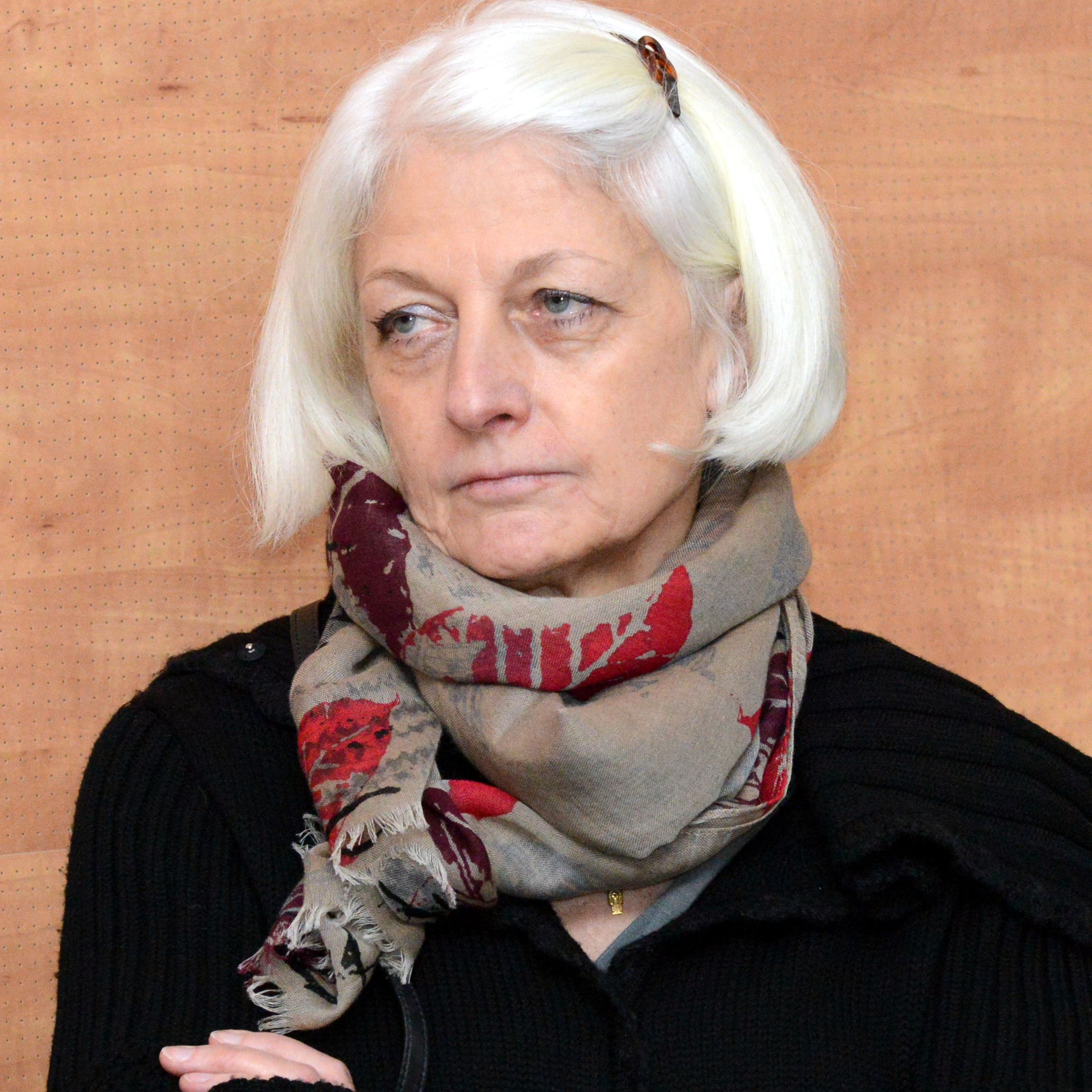 Christine Gläser, ambassadrice d'Allemagne à Luxembourg, au Cube 521 à Marnach. Le 18 décembre 2014, sur initiative de l'ambassade du Royaume-Uni, une délégation de diplomates visita le couvent de Cinqfontaines. Entre 1941 et 1943 ce site servait à l'occupant allemand de camp d'internement de la population juive. La délégation fut accueillie par le Père Jean-Jacques Flammang de la Congrégation des prêtres du Sacré-Coeur qui offrit le petit déjeuner et présenta le couvent. Lors d'une visite des lieux, l'historien Marc Schoentgen décrivit les conditions de vie extrêmes des personnes internées qui furent transférées par après vers les camps de concentration d’Auschwitz, de Theresienstadt (Térézin), de Litzmannstadt (Lodz) et d’Izbica. L'architecte Christoph Rosenberg présenta le projet d'un «Centre de rencontre et de mémoire de la Shoah» à cet endroit historique et Henri Juda, président de MemoShoah, détailla en profondeur le concept, qui a le support de la Congrégation des prêtres du Sacré-Coeur. La délégation se rendit ensuite à Marnach au Cube 521 où elle fut accueillie par la directrice Odile Simon qui présenta le Centre culturel et invita à un déjeuner campagnard. L'historien Paul Dostert y retraça l'histoire de la persécution de la population juive luxembourgeoise pendant la Seconde Guerre mondiale et informa des récentes découvertes historiques à ce sujet.